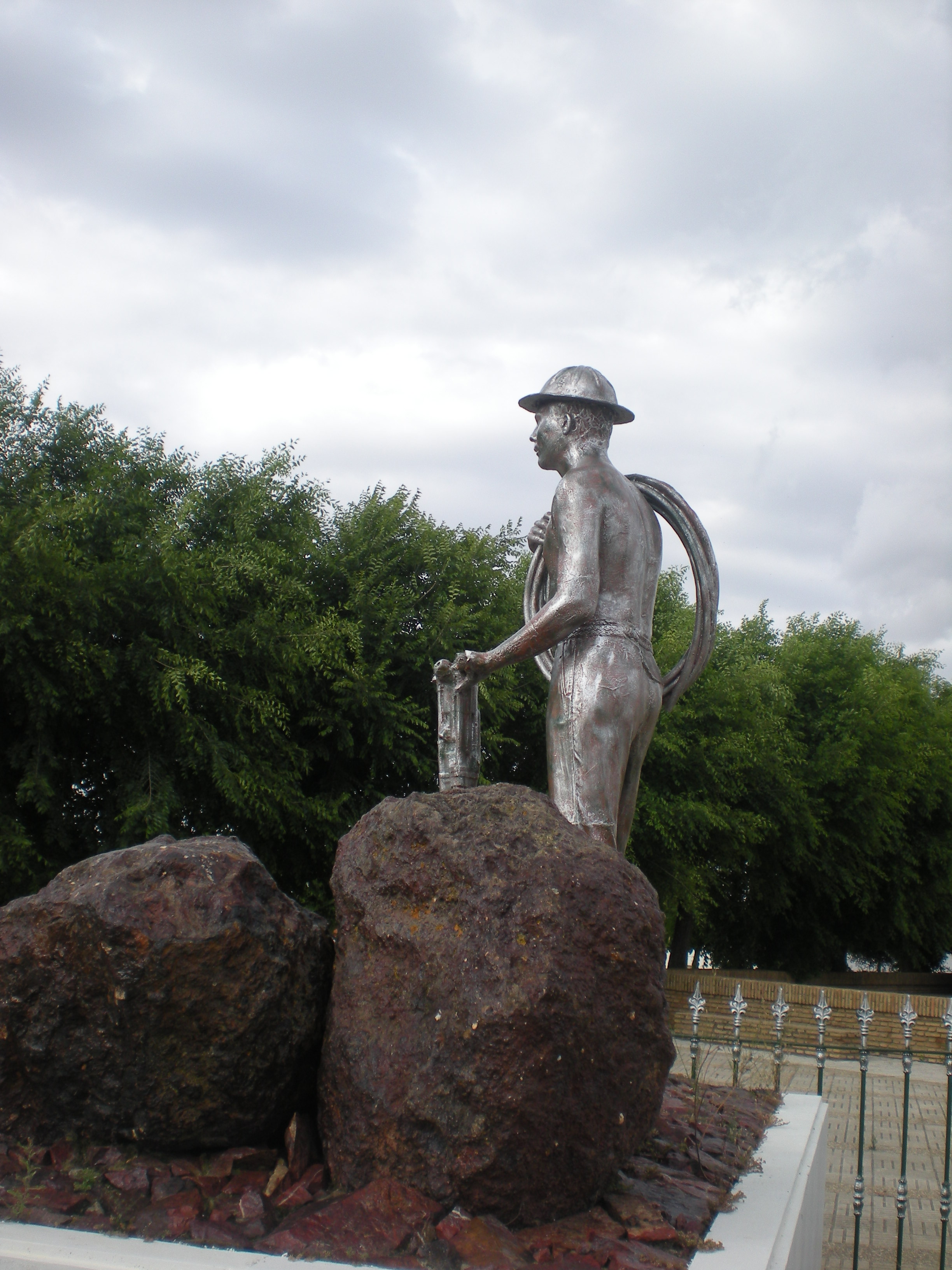 monumento al minero